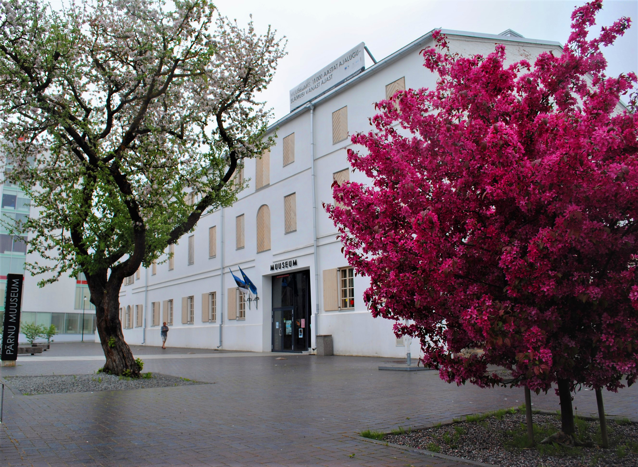 Pärnu Muuseum